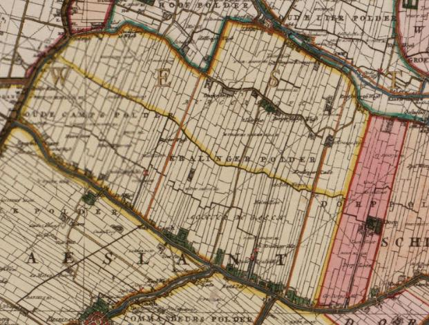 Kralingerpolder.